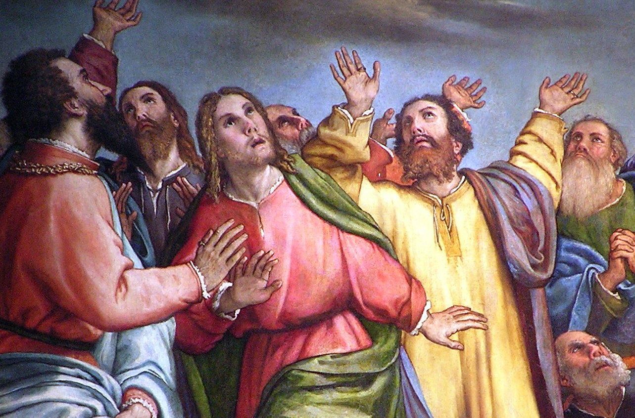 La foto rappresenta un particolare l'Assunzione di Lorenzo Lotto, pala d'altare dipinta intorno al 1549 per la chiesa di San Francesco alle Scale di Ancona. Nella foto si nota l'atteggiamento di sgomento di un gruppo di apostoli (al centro San Giovanni) dinanzi al miracolo dell'Assunzione di Maria.